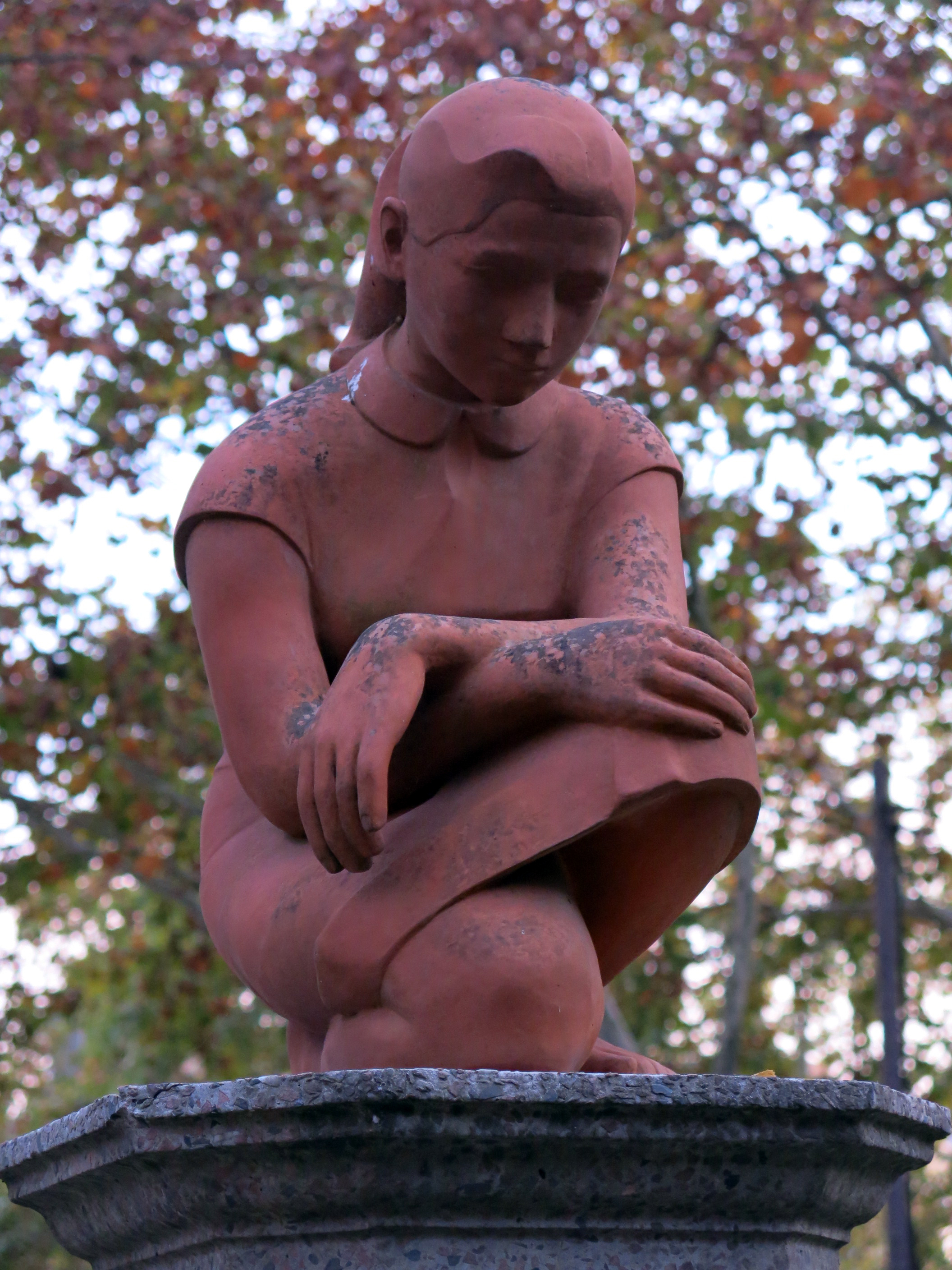 Noia, de Jordi Dalmau, Parc de la Devesa (Girona)